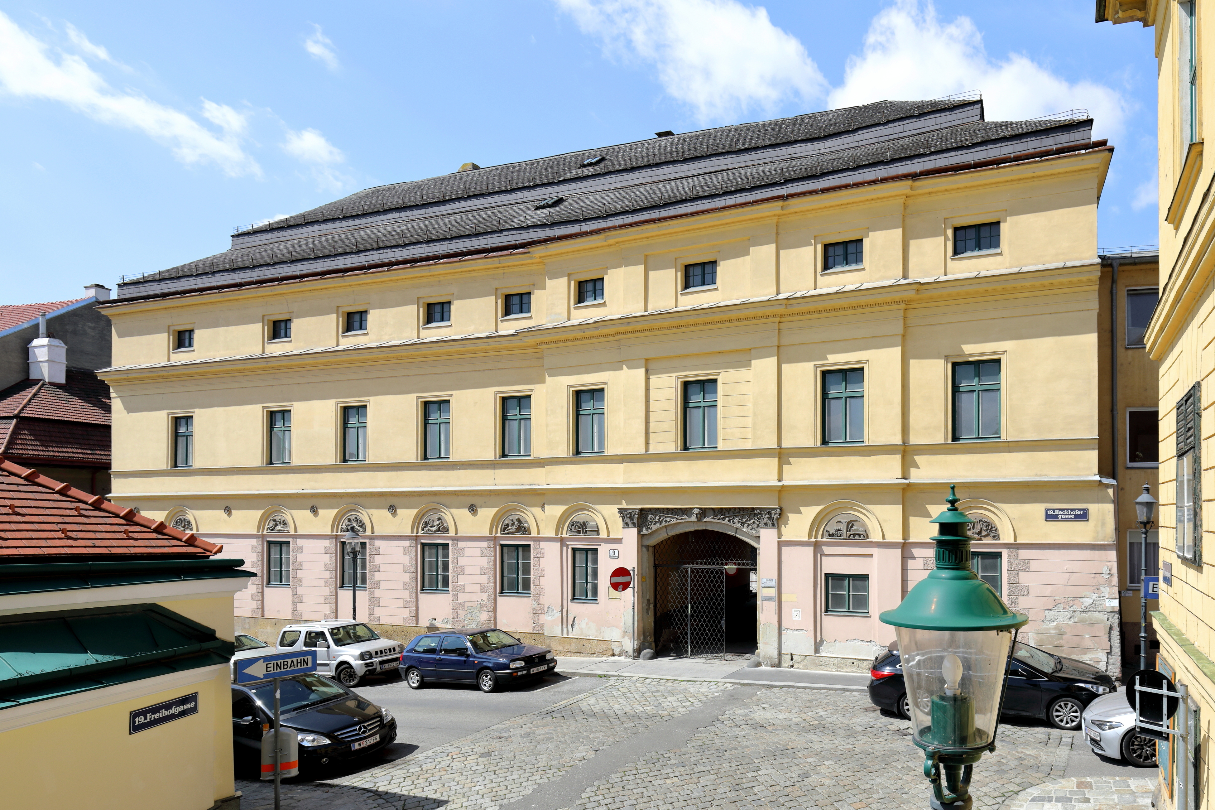 Ehemaliges Brauhaus (Hackhofergasse 9) in Nussdorf, ein Bezirksteil des 19. Wiener Gemeindebezirkes Döbling.1690 als Wirtschaftshof des Jesuitenkollegiums errichtet, kam es 1819 in den Besitz von Franz Xaver Bosch, der den Jesuitenhof zu einer Brauerei umbaute (Nußdorfer Bierbrauerei). Um 1830 wurde die Betriebsstätte wesentlich vergrößert. In diesem Zuge wurde die Straßenfassade neu gestaltet. Unter anderem mit Reliefszenen aus dem Bierbrauereigewerbe sowie den vier Jahreszeiten.